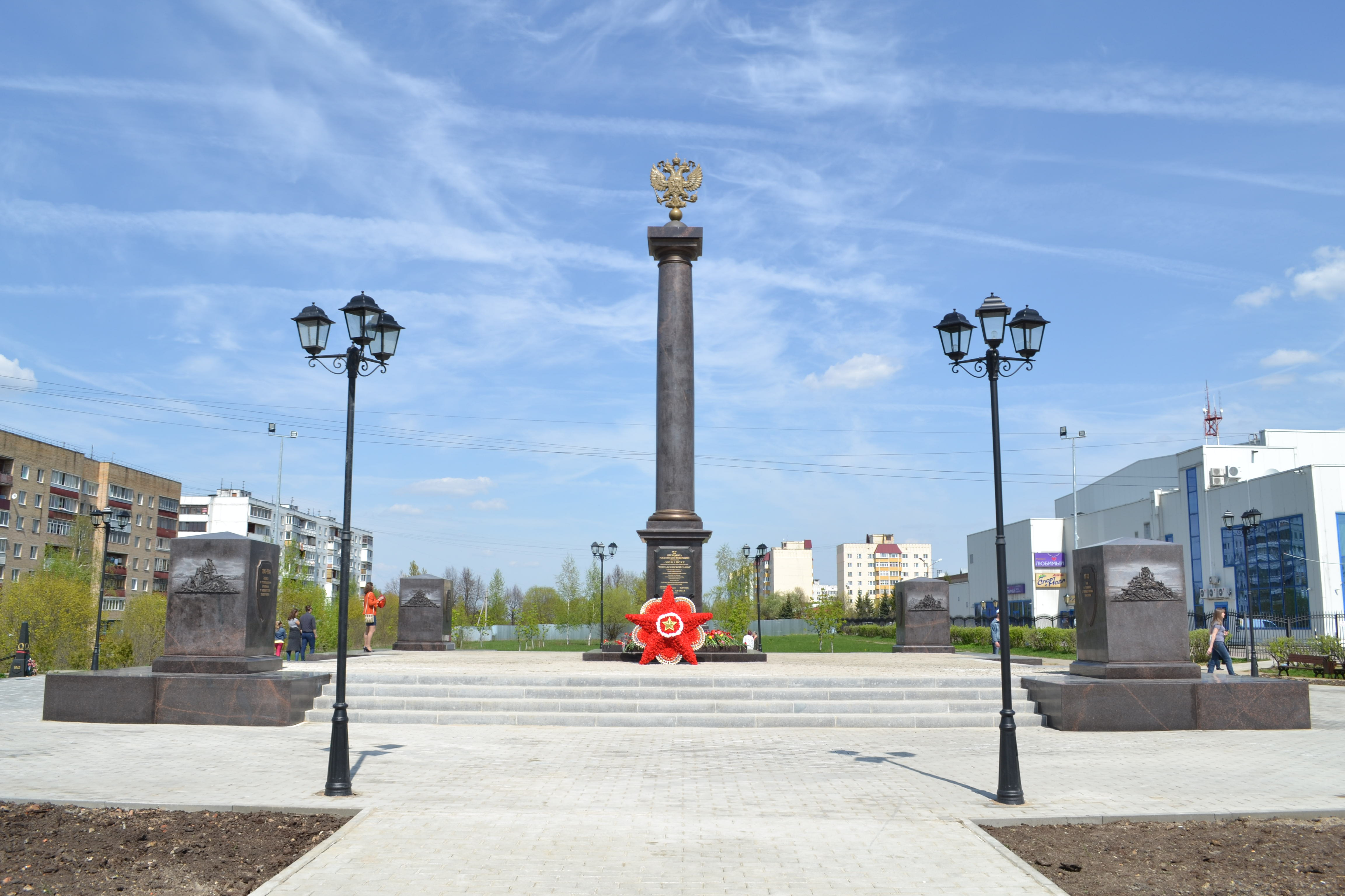 Памятник-стела «Город воинской славы». Можайск